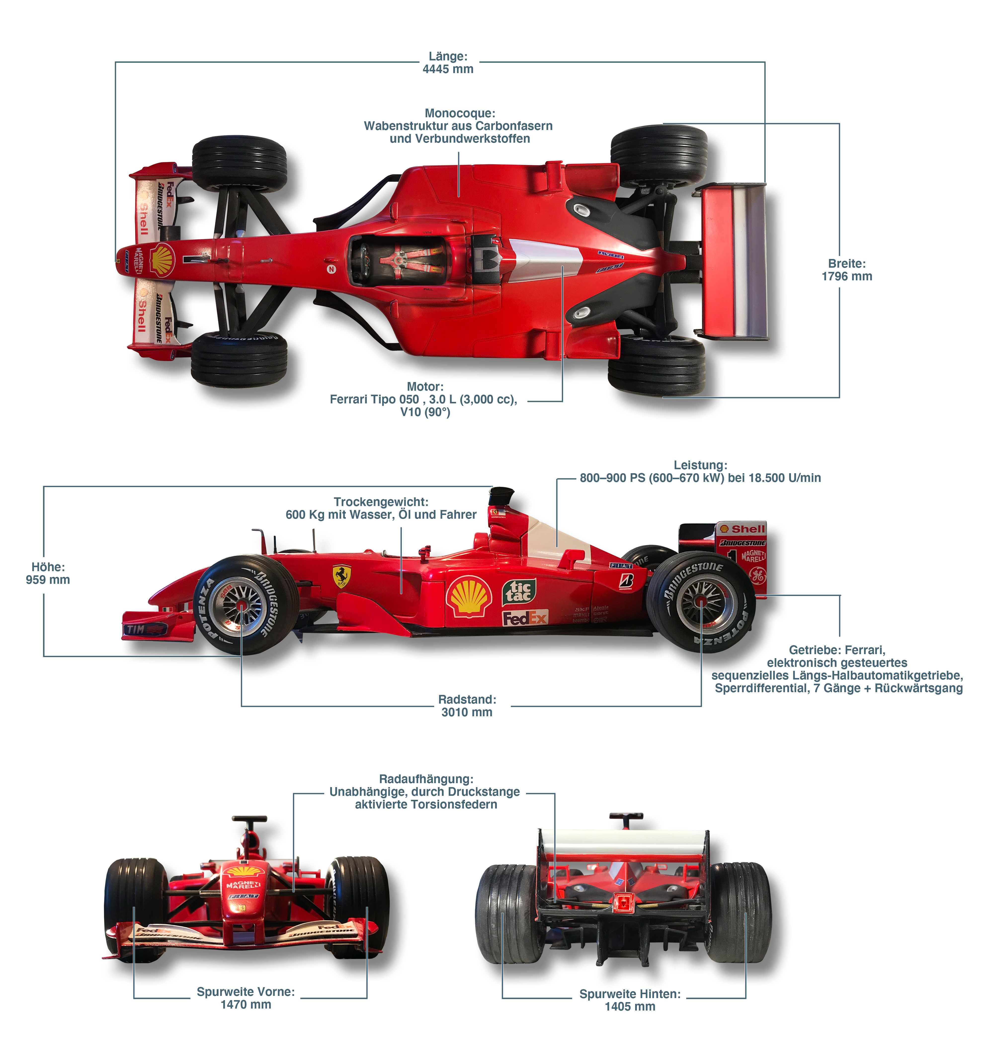 Grafisch aufbereitete Basis-Informationen zum Ferrari F2001 anhand eines 1:18 Scale-Modells